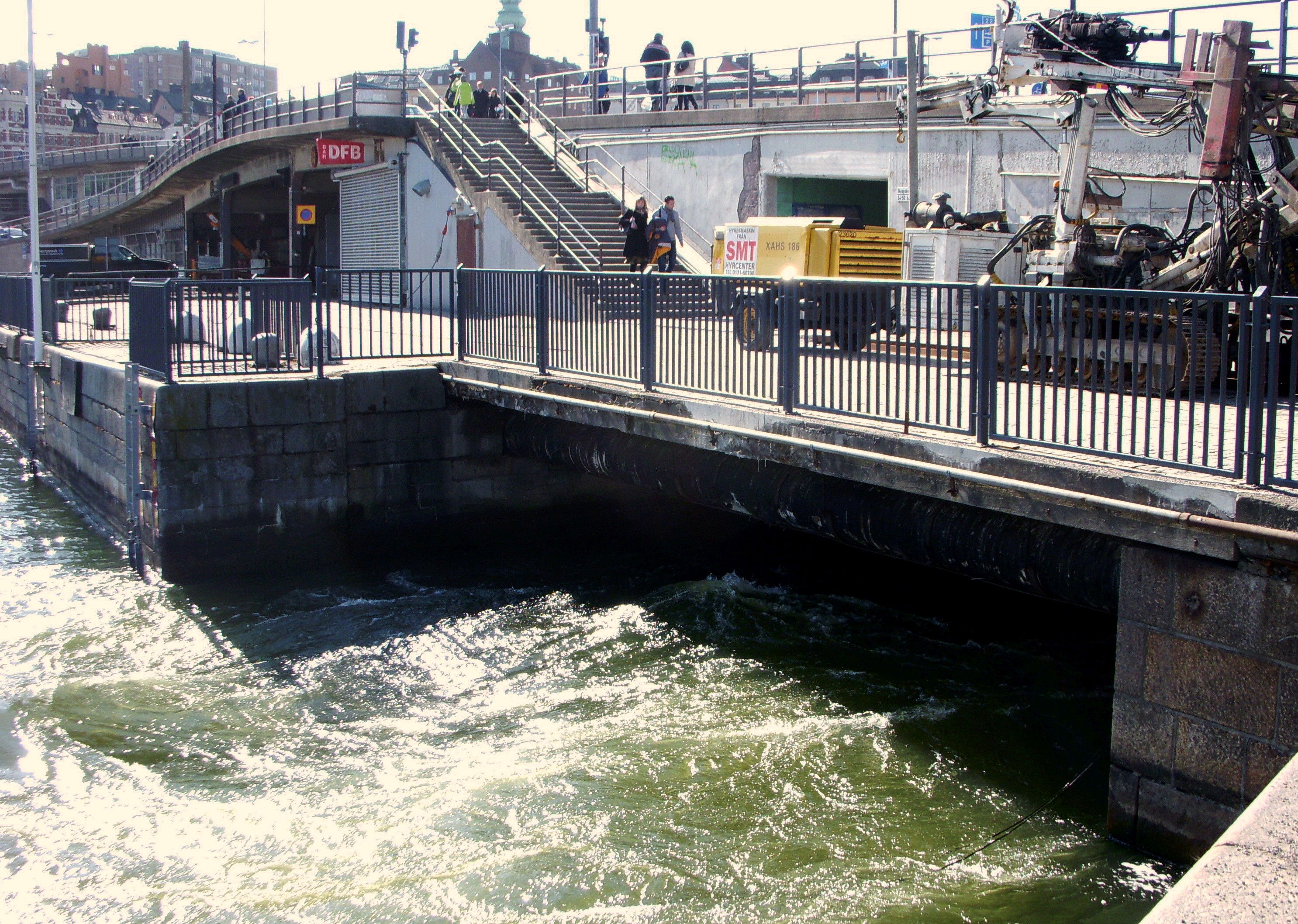 Mälaren tappas genom gamla Nils Ericsons sluss, Slussen Stockholm